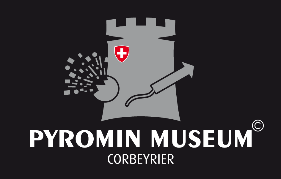 Logo des Pyromin Museums, Corbeyrier VD, Schweiz